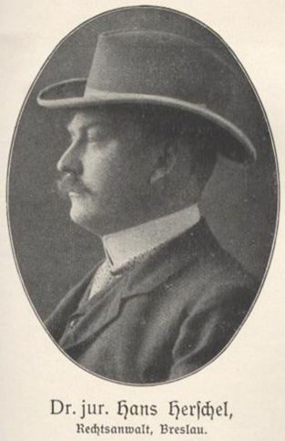 Hans Herschel (1875-1930), Reichstagsabgeordneter (Zentrum), Bürgermeister von Breslau